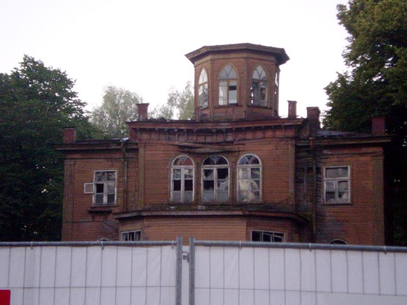 Now that they've knocked down the supermarket you can see this old building from the road.